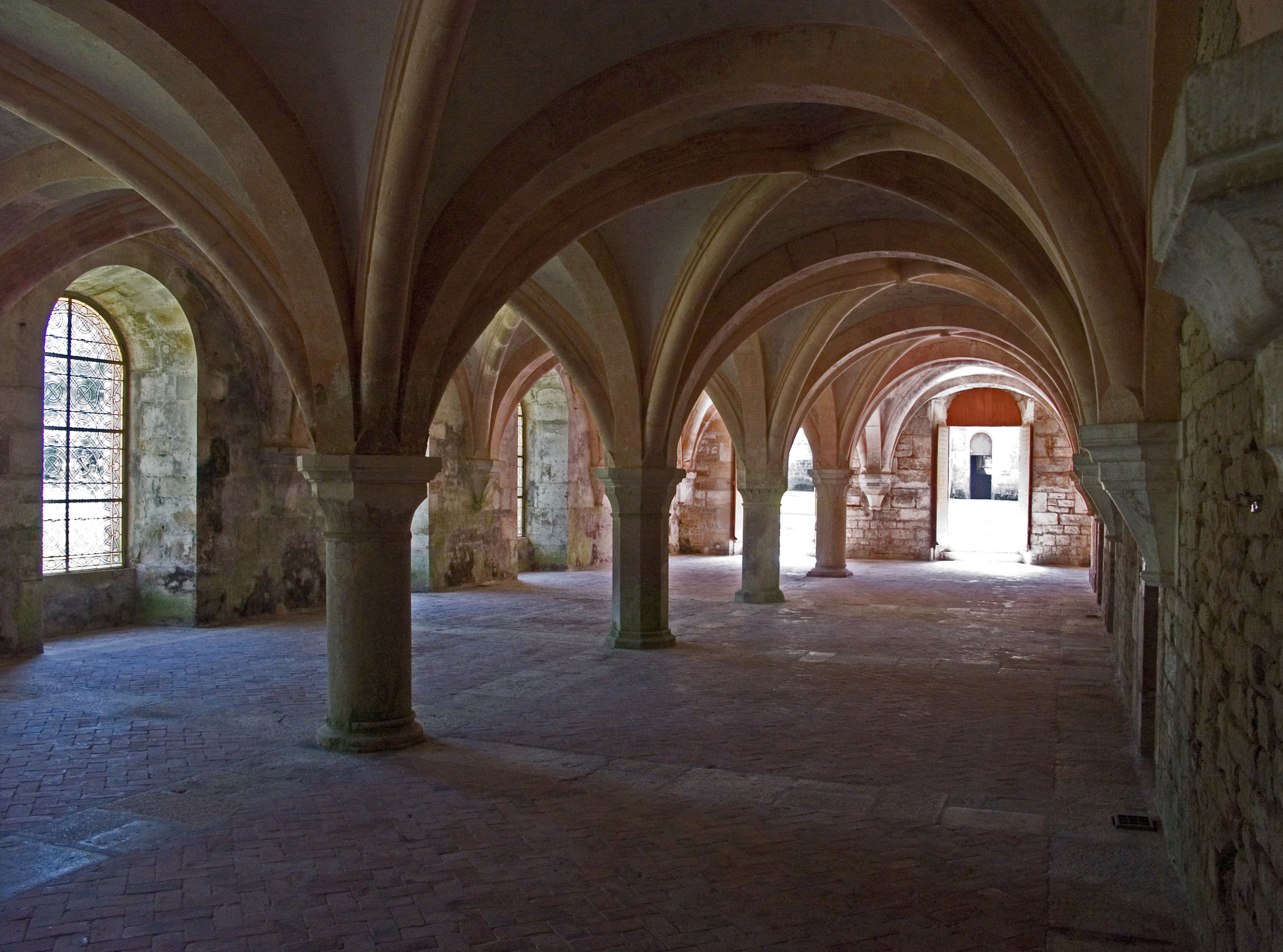 Abbaye de Fontenay - Scriptorium